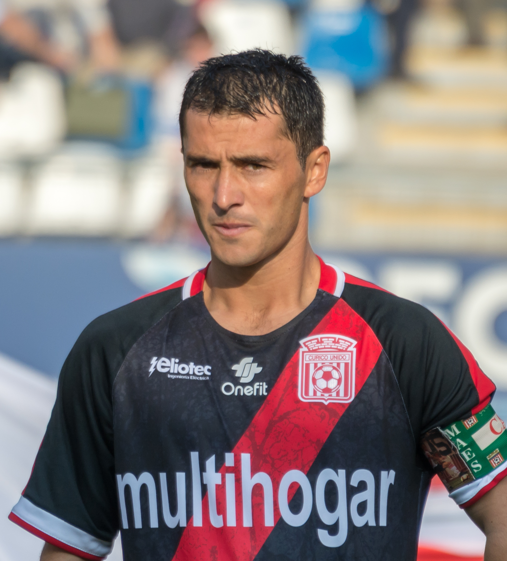 Martín Cortés, Universidad Católica v Curicó Unido, Estadio San Carlos de Apoquindo, Las Condes, Santiago, Región Metropolitana, Chile.